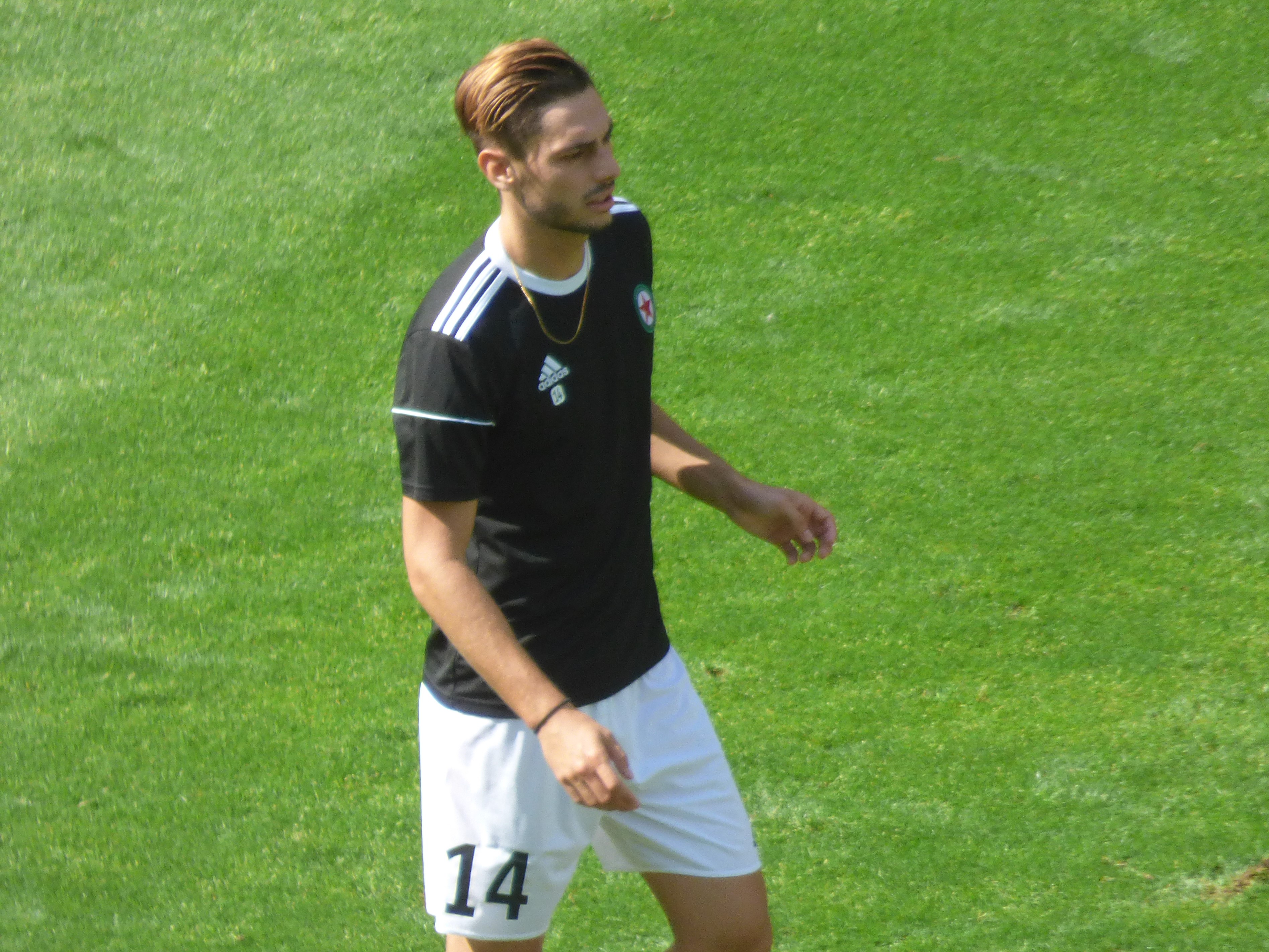 Grégory Berthier avant le match RC Lens / Red Star, comptant pour la deuxième journée du championnat de France de Ligue 2 2018-2019 au Stade Bollaert-Delelis, le 4 août 2018.